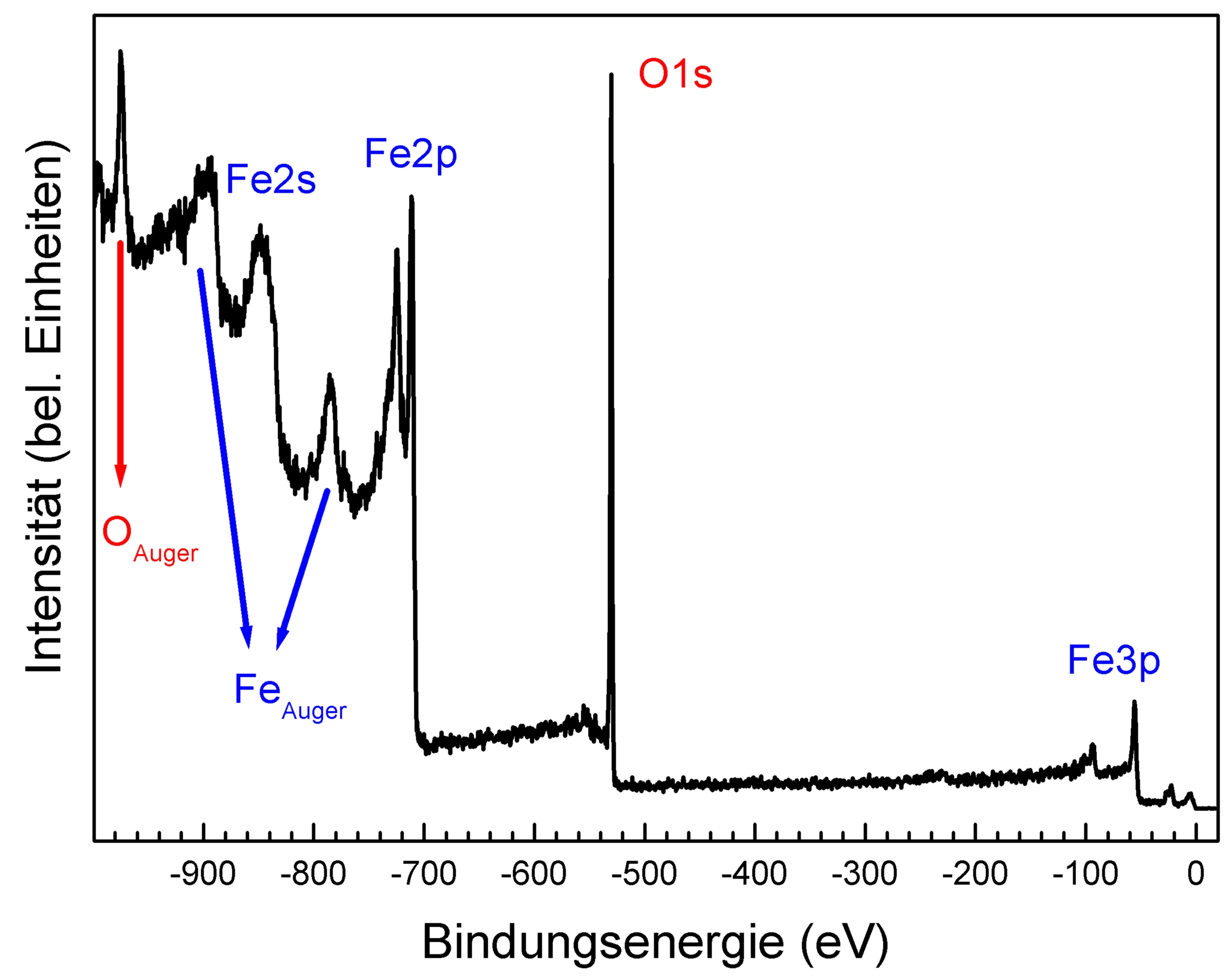 XPS-Spektrum von Magnetit (Fe3O4), Auftragung der Bindungsenergie der spektroskopierten Elektronen über die Intensität (Zählrate). Die Energieachse wurde auf das chemische Potenzial kalibriert und das Spektrum wurde mit einer monochromatisierten Al Kα-Röntgenquelle erzeugt.